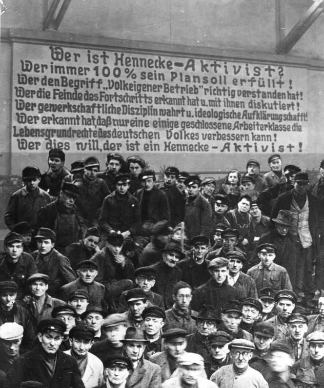 SBZ, Aktivisten-Bewegung Sowjetische Besatzungszone.- Arbeiter eines volkseigenen Betriebes vor einem Propagandaplakat der Hennecke-Bewegung, Aktivisten-Bewegung (Fotomontage)